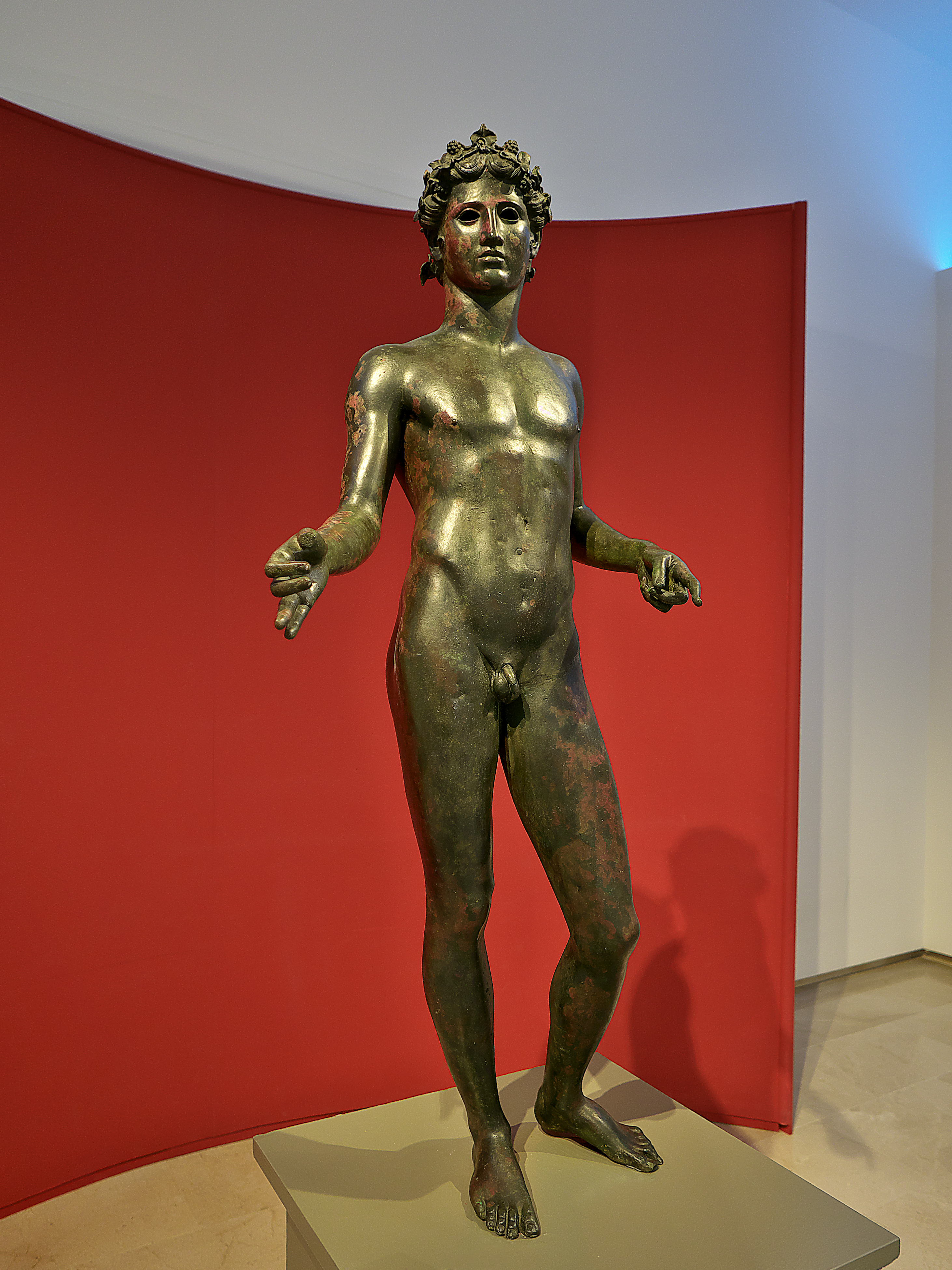 Museo de la Ciudad de Antequera. Réplica del famoso ephebo de Anticaria (s. I d.C.), fundida (2004) en bronce a tamaño natural por Talleres Capa (Arganda del Rey).